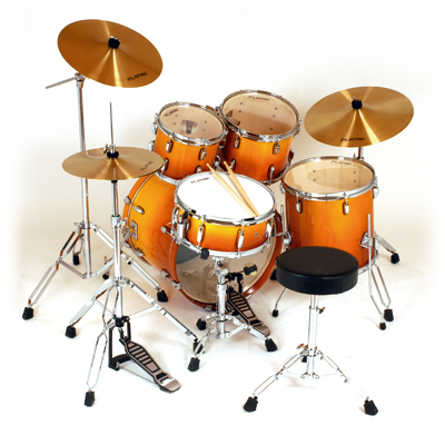 Platin Drums Classic Set 2216 Amber Fade